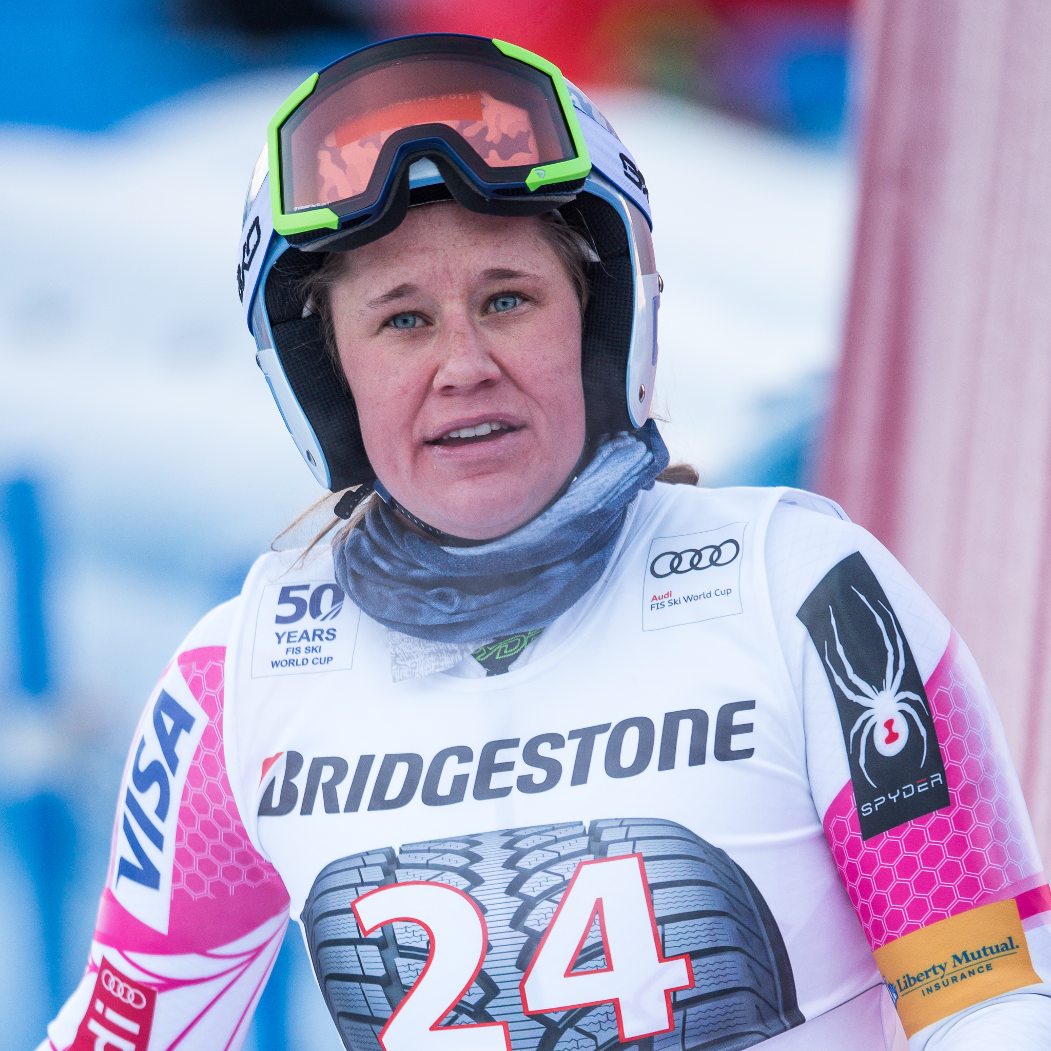 64. Kandahar Rennen,Alice McKennis,Audi FIS Ski Weltcup Garmisch-Partenkirchen,Damen Abfahrt,Kandahar,Ladies Downhill